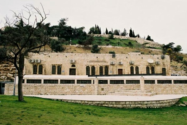 מרכז המוסיקה העירוני ע"ש אלפרט שנמצא בגיא בין הינום, ירושלים.